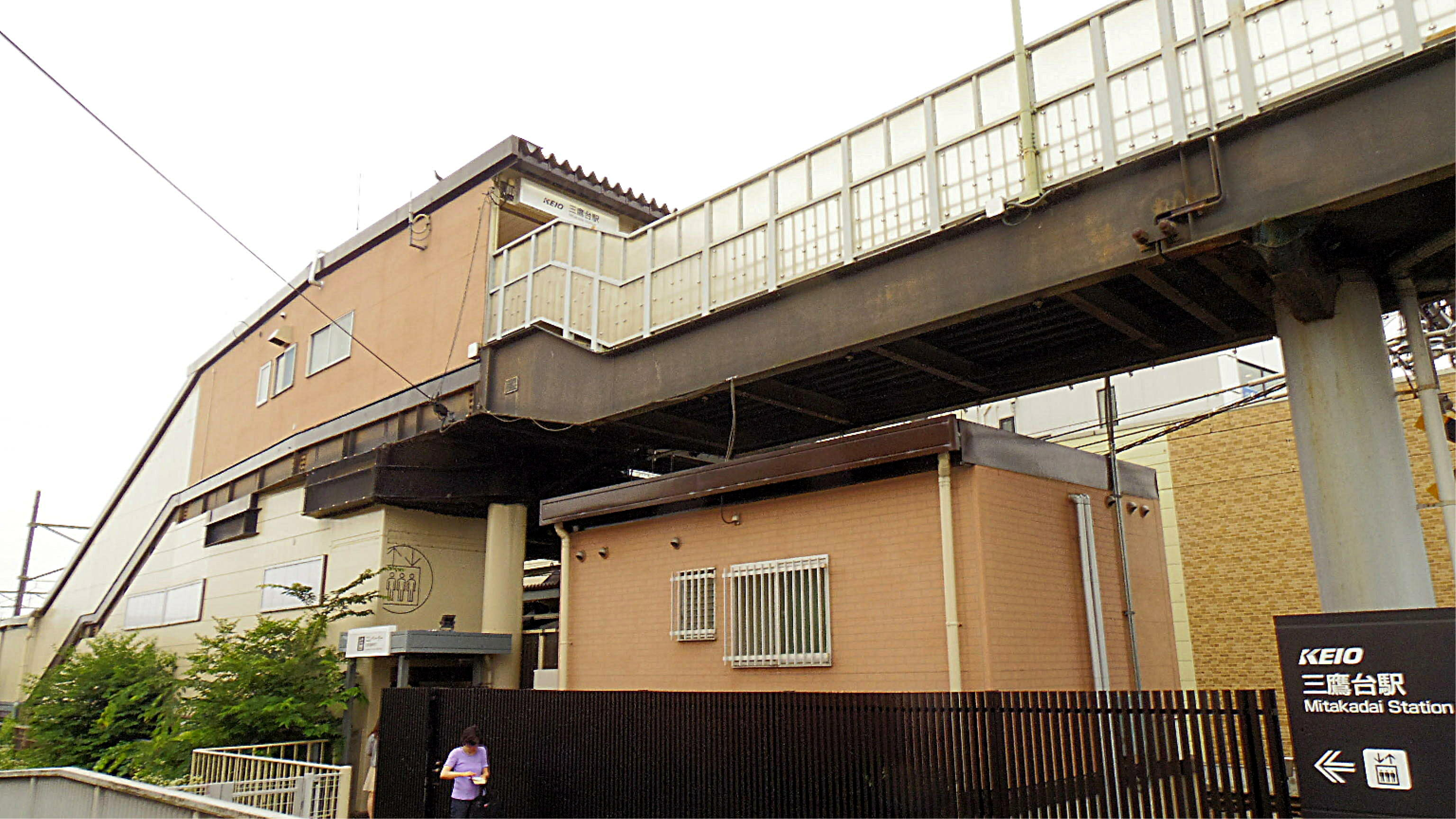 京王井の頭線三鷹台駅（2016年6月19日撮影）